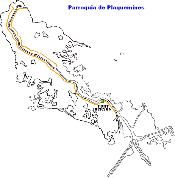 Fort Jackson, Louisiana